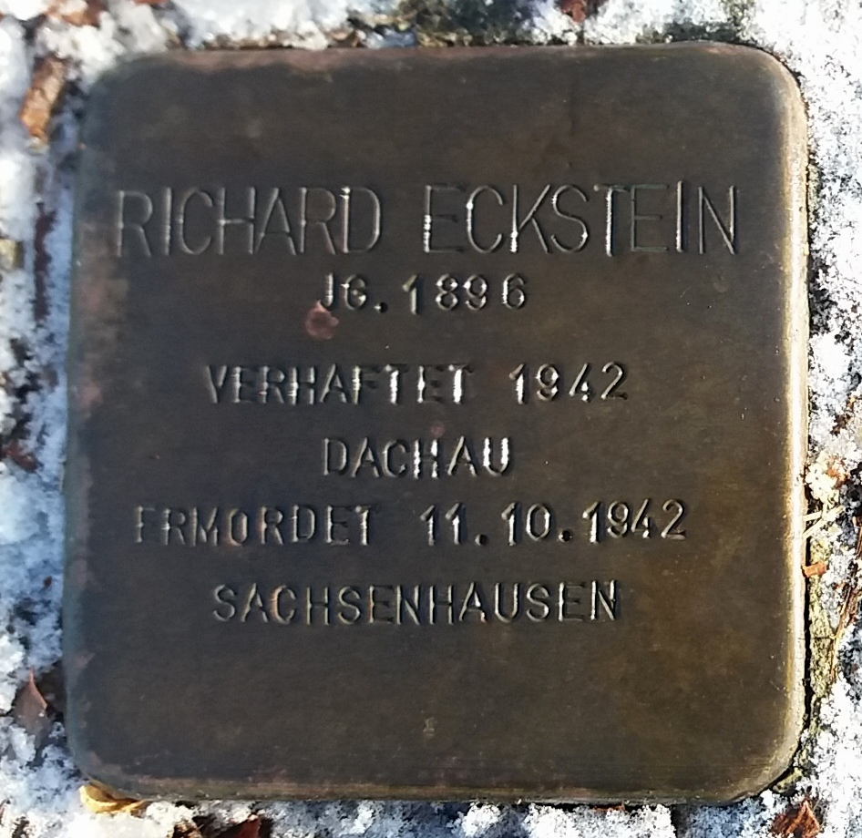 Stolperstein für Richard Eckstein, Mitglied der Großfamilie Eckstein, Vöhringen (Iller)